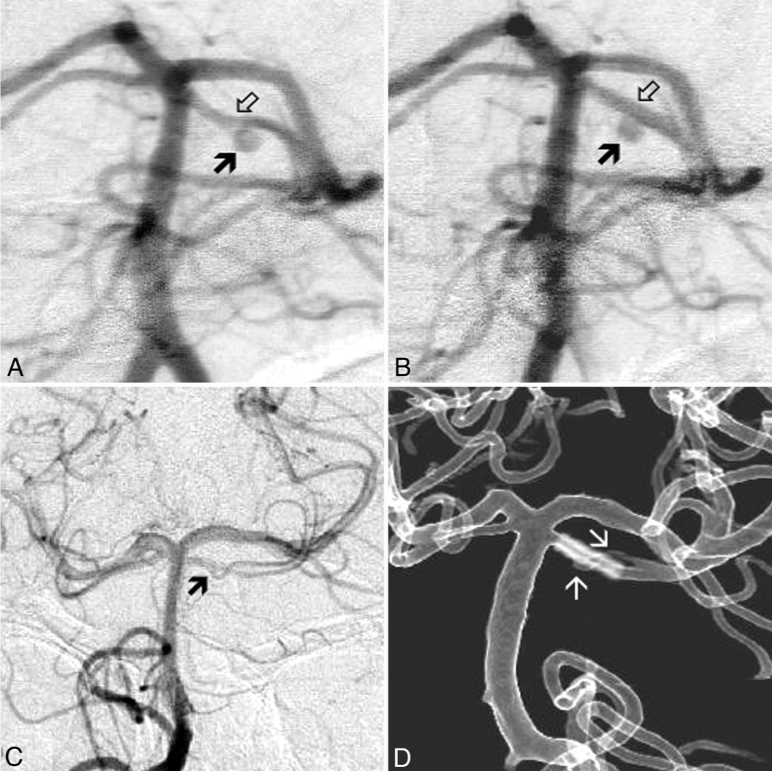 En angiografía, se aprecia un aneurisma de arteria cerebelosa superior antes (A) y después (B) de colocación de stent. En los controles ulteriores se observa que el aneurisma está curado (C) y cómo el stent (D) no daña la arteria